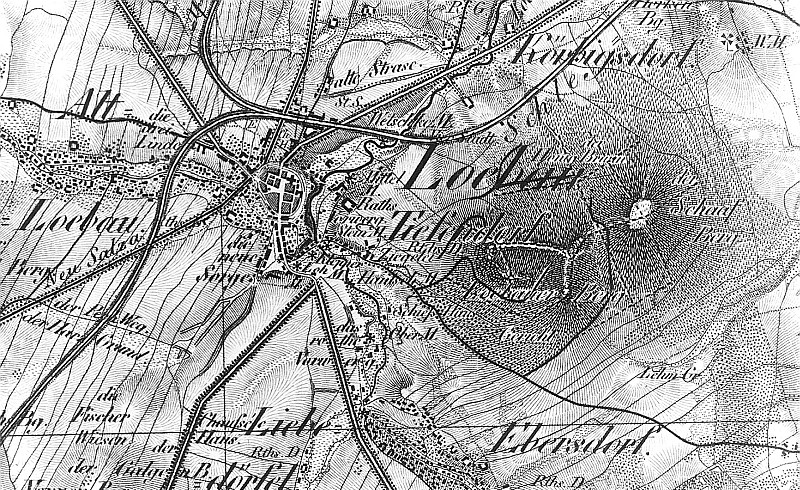 Original image description from the Deutsche Fotothek Löbau. Oberreit, Sect. Zittau, 1844/46